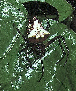 Verrucosa arenata from Mexico.